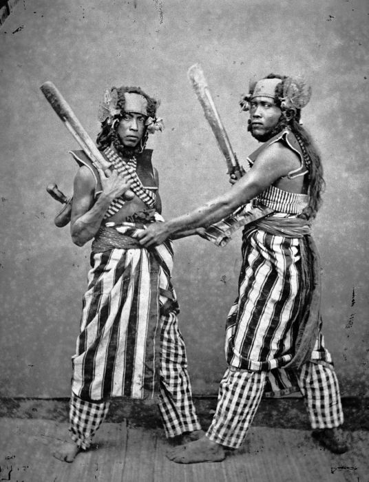 Foto. Lombokkers in feesttenue voeren een traditionele krijgsdans uit.